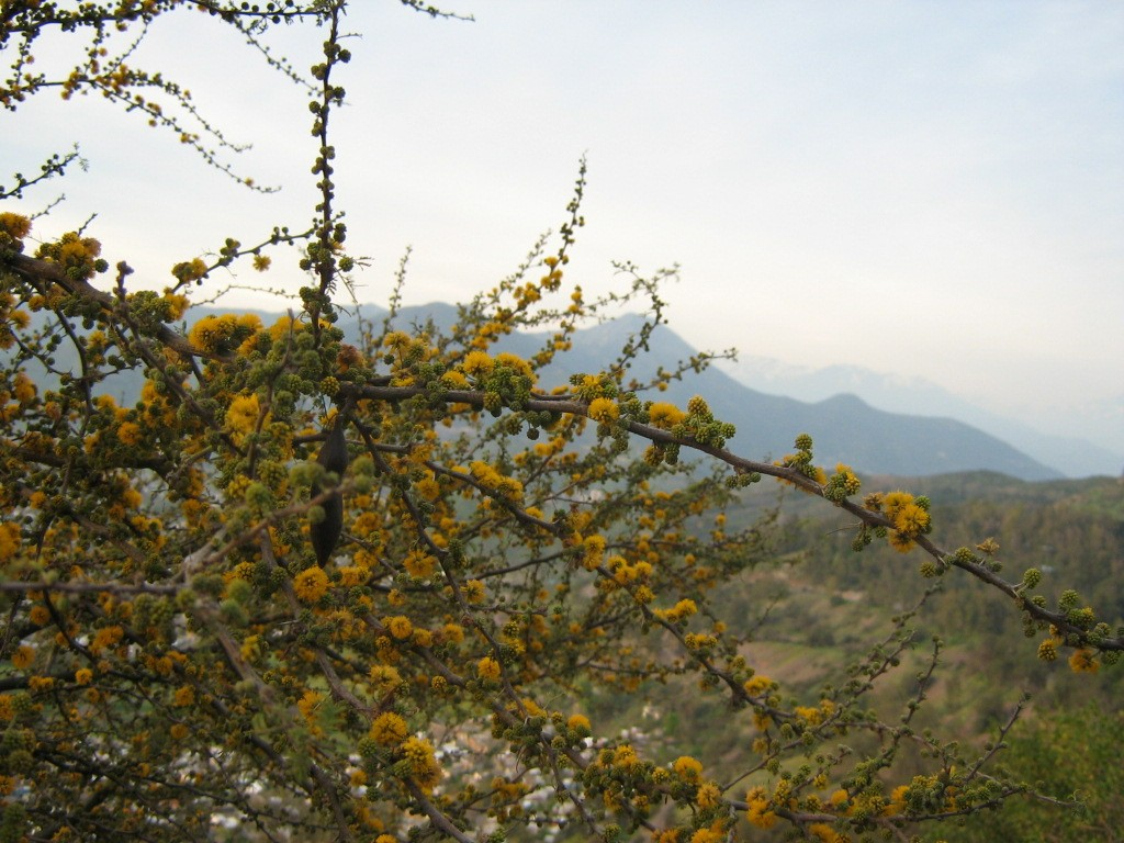 Acacia caven Molina, scrubland central Chile, flowered stems Species Acacia caven Genus Acacia Subfamilia Mimosoideae